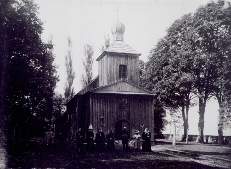 Беларуская (тарашкевіца): Голдава (Hołdava). Царква